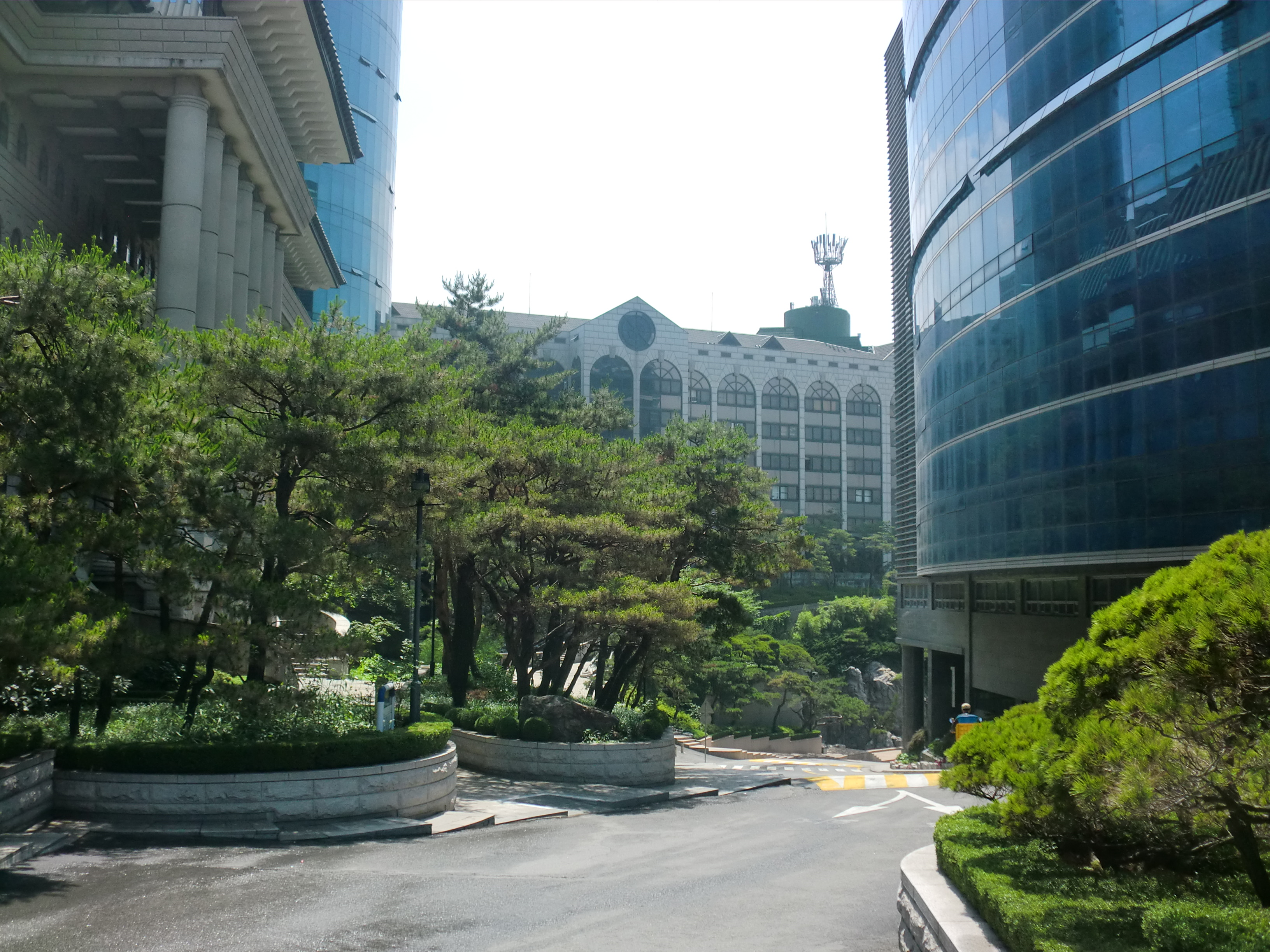 서울특별시 성북구에 있는 서경대학교